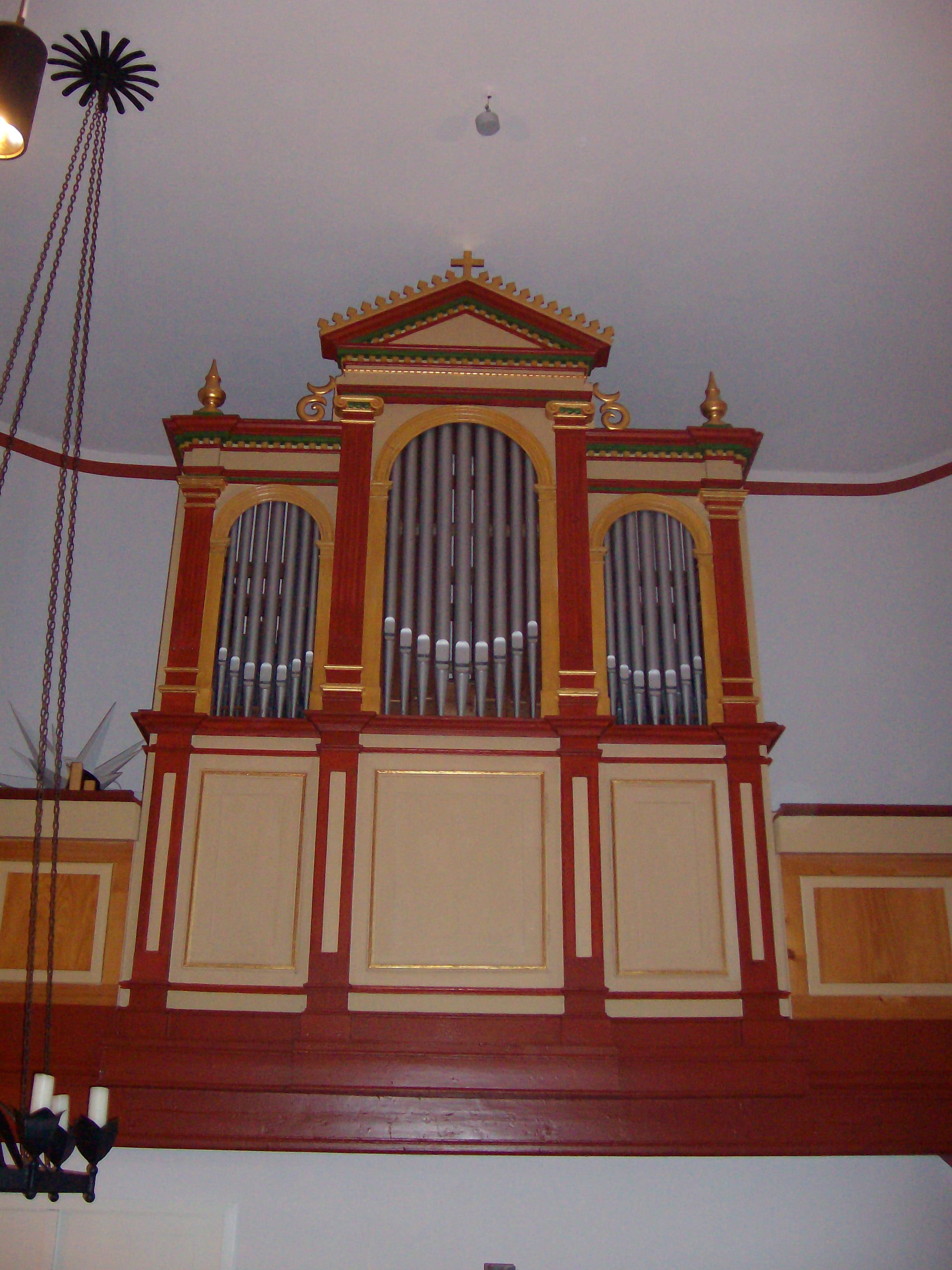 Orgel der Evangelischen Kirche Lauter, Laubach, Landkreis Gießen, Hessen, Deutschland